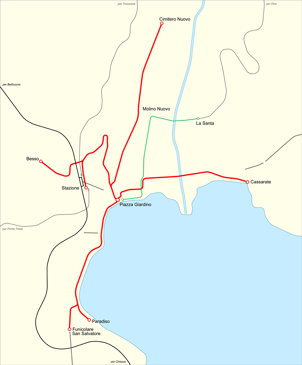 Mappa della rete tranviaria di Lugano alla sua massima estensione (dal 1927 al 1954).